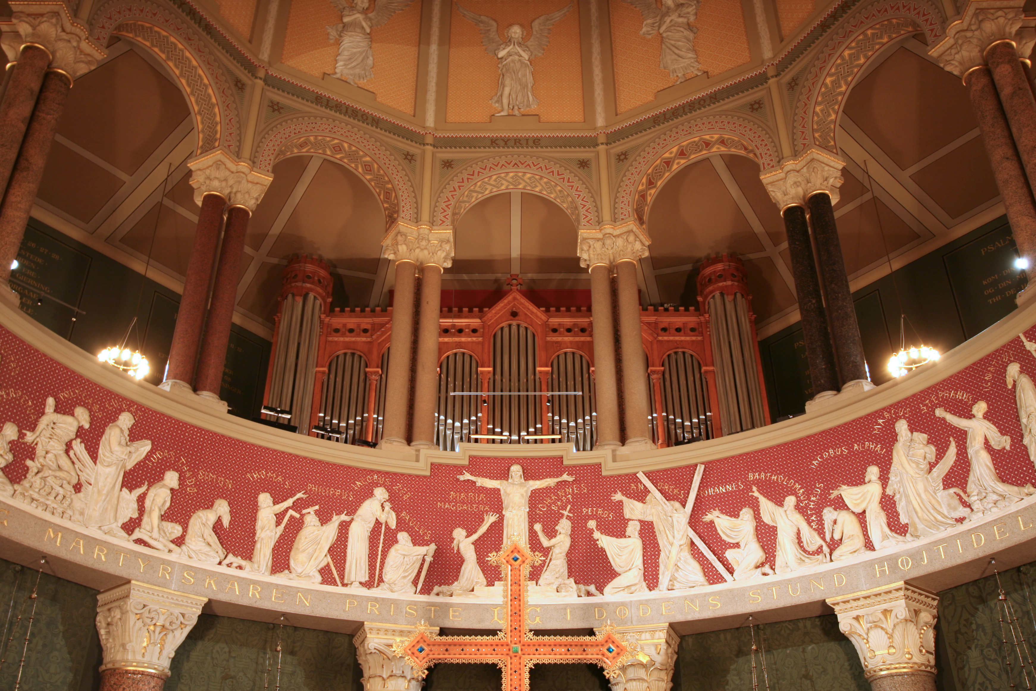 Jesuskirken, Valby, Copenhagen, Denmark Quire organ. Build by Aristide Cavaillé-Coll